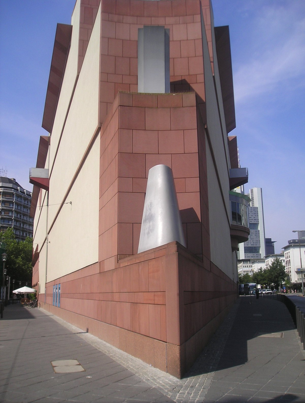 Museum für Moderne Kunst (MMK), Frankfurt am Main, Germany